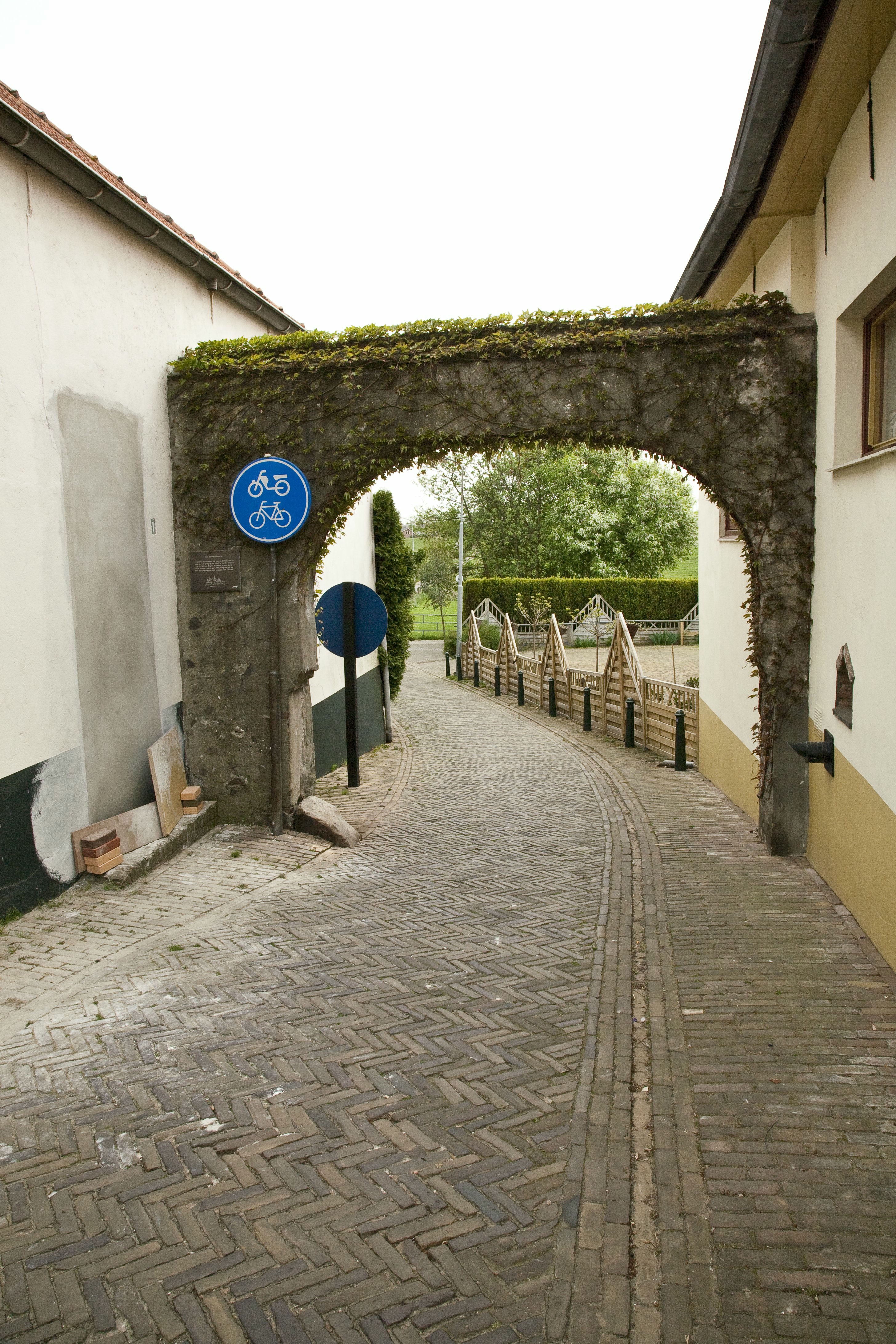 Schipperspoortje: Zicht op de voormalige toegang tot de aanlegsteiger van de rijnschepen (opmerking: Publicatie: TRAP Pannerdensch Kanaal (Cultuurhistorische Routes in Nederland - 58))